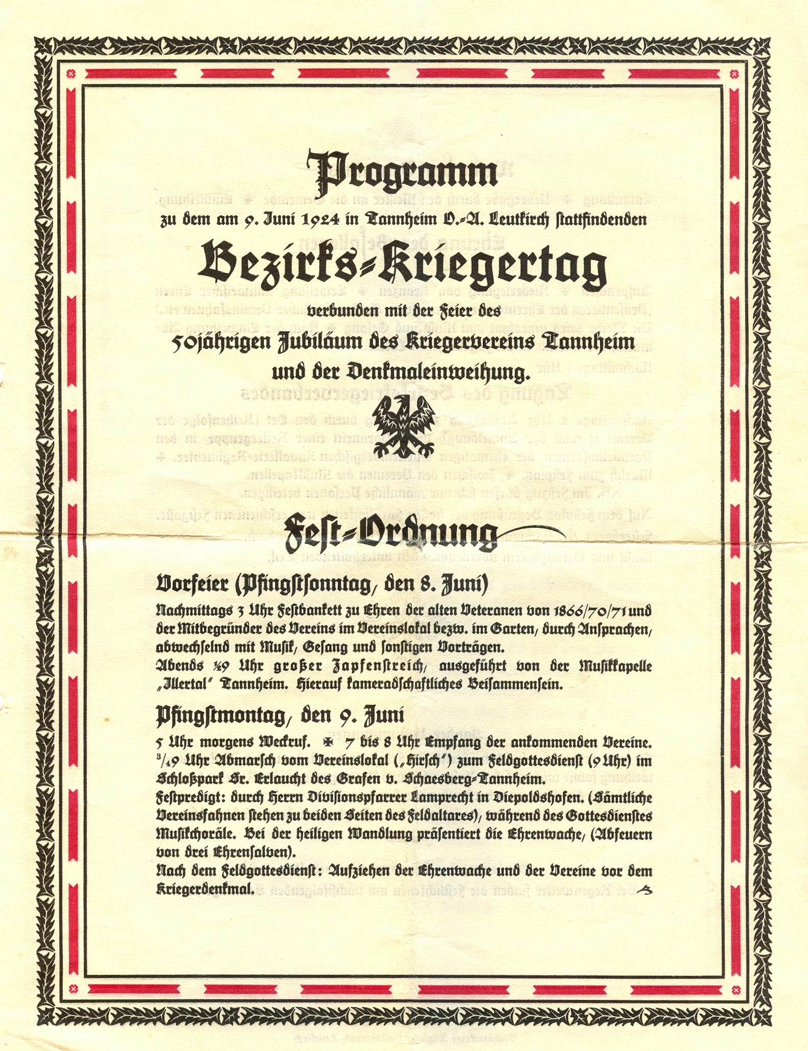 Bezirks-Kriegertag (Programm)